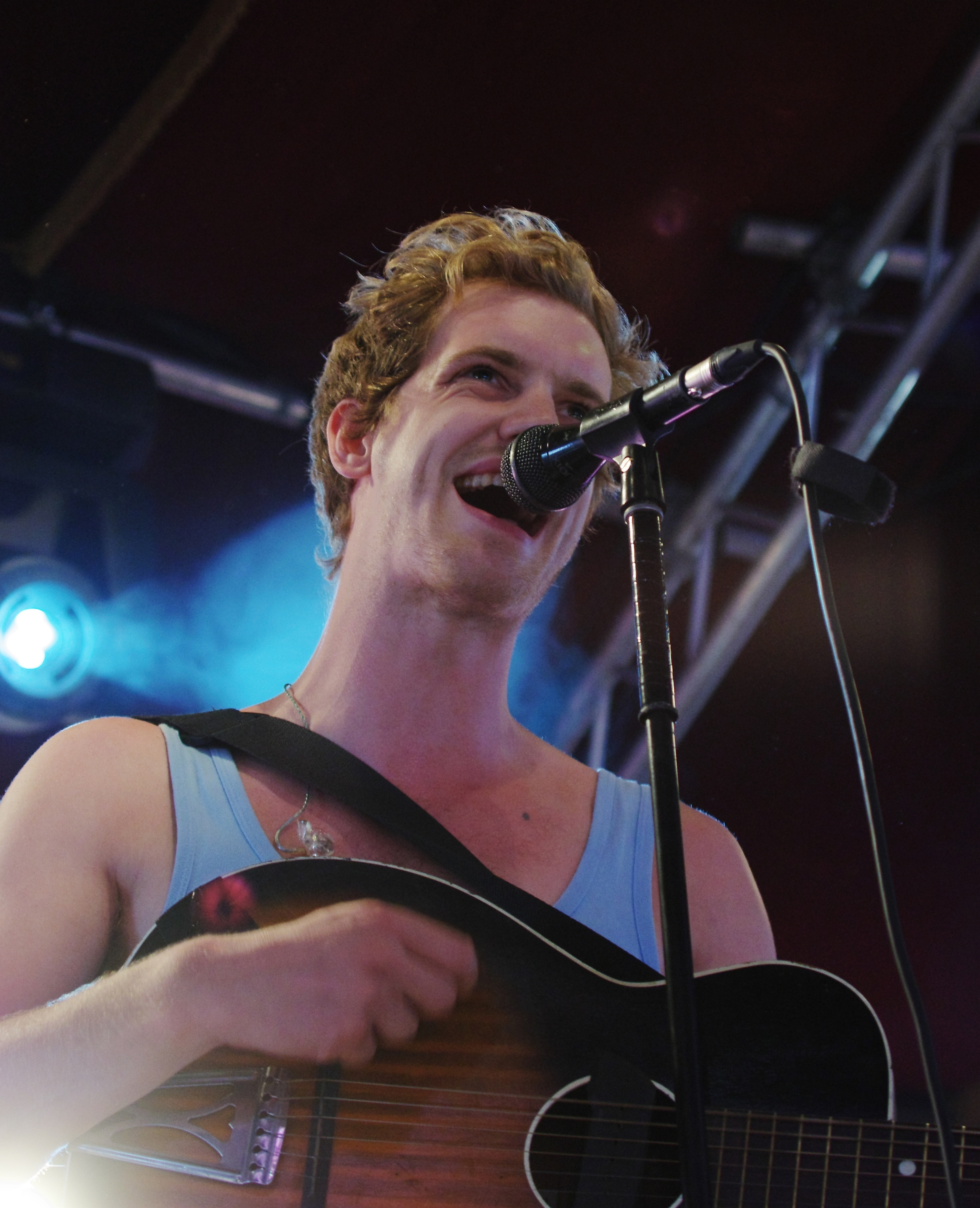 Die belgische Indie-Rockgruppe Balthazar beim Haldern Pop Festival 2013. Besetzung: Maarten Devoldere (Leadgesang, Gitarre, Keyboard); Jinte Deprez (Leadgesang, Gitarre); Patricia Vanneste (Gesang, Violine, Keyboard); Simon Casier (Bass, Gesang); Christophe Claeys (Schlagzeug)